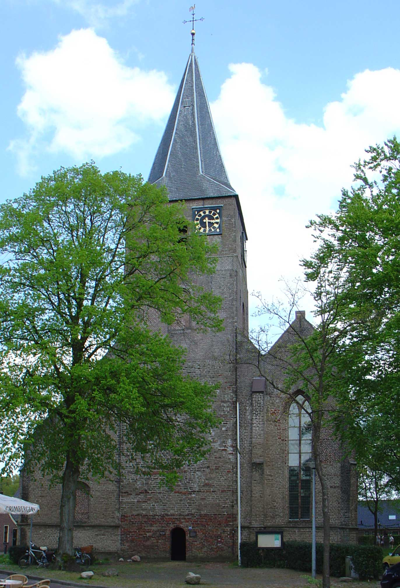 Zicht op een deel van de Protestantse Sint-Pancratiuskerk van Diever